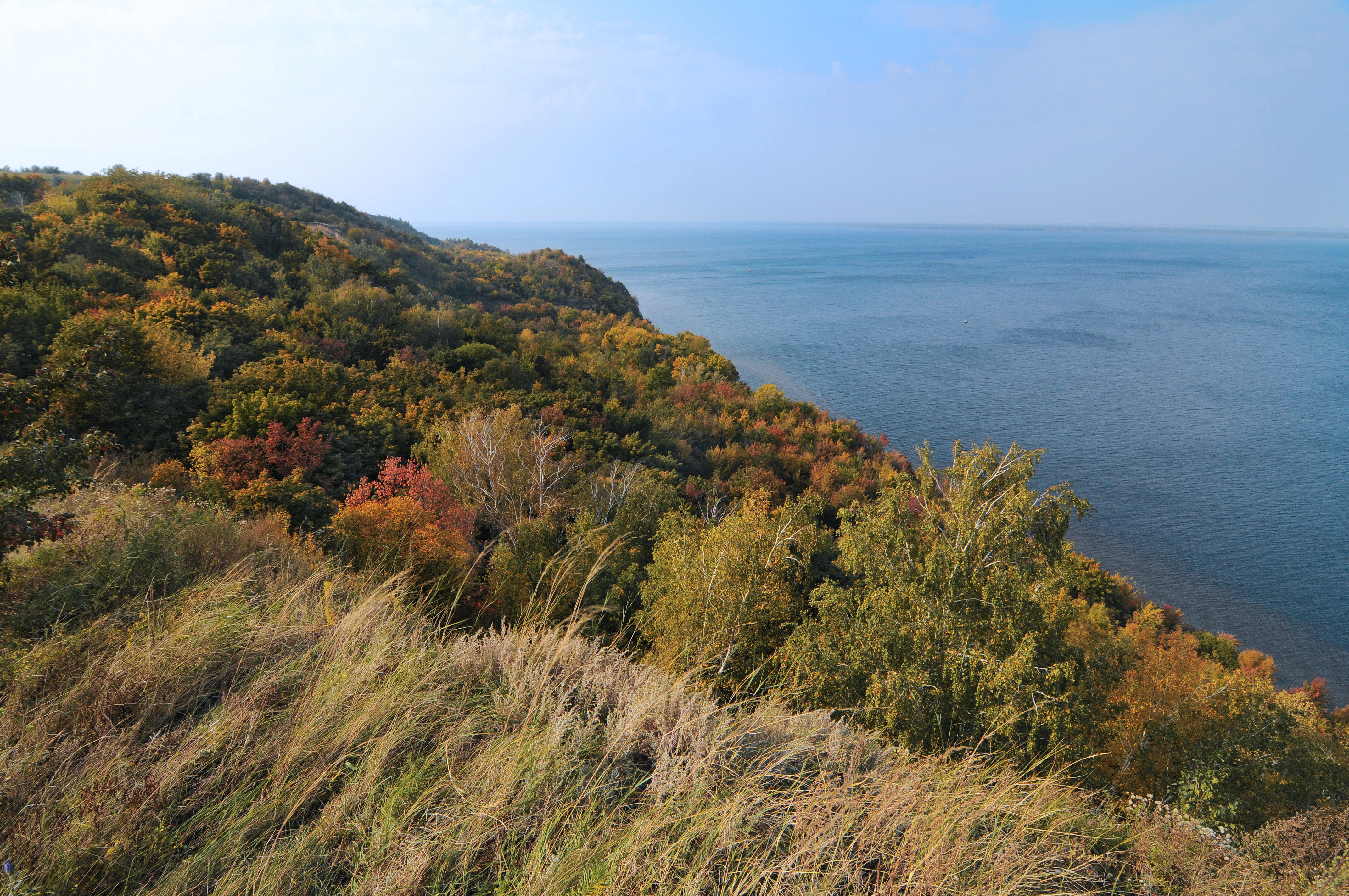 Костівщина в Трахтемирові